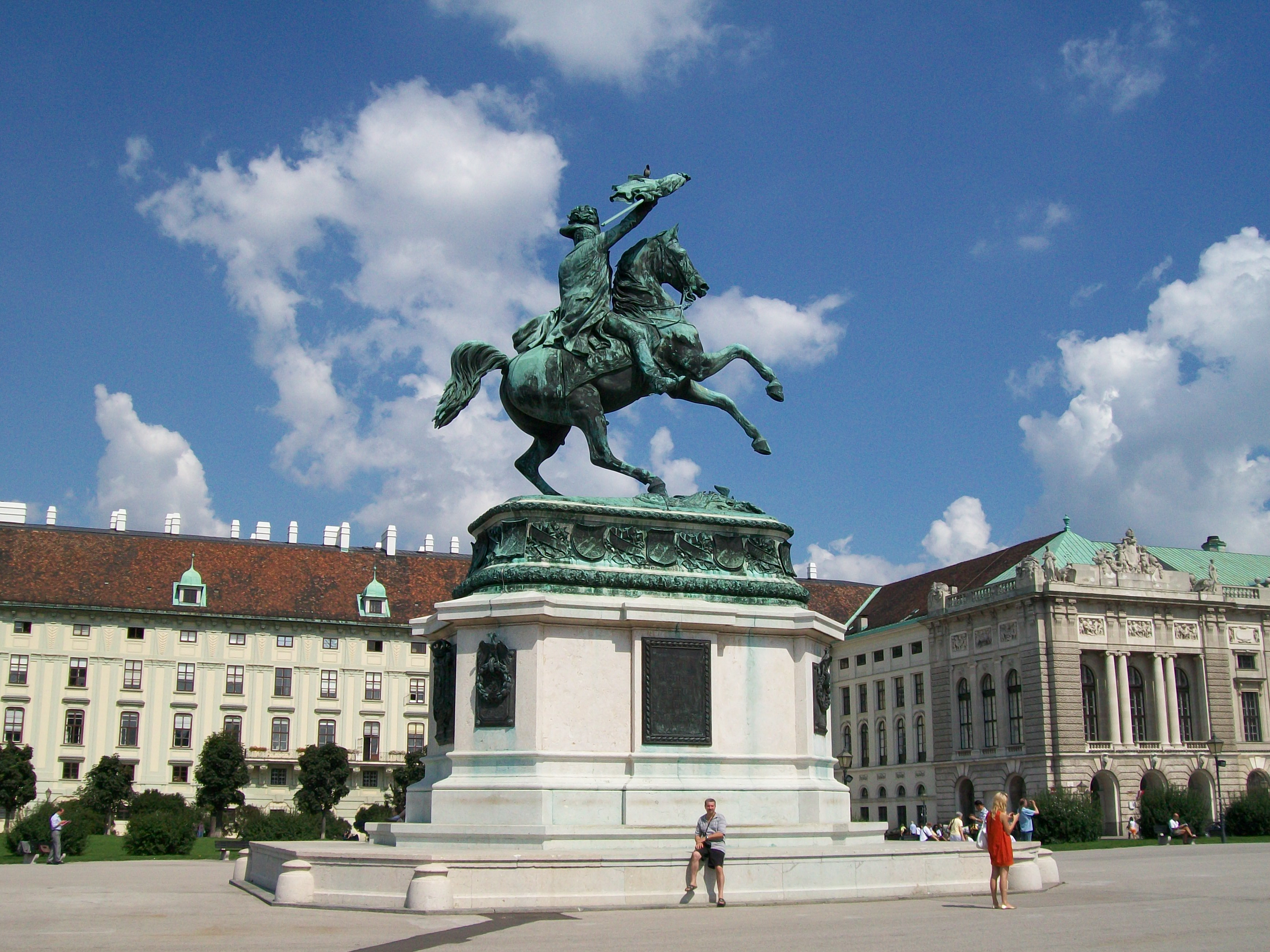 Socha Erzherzog Karl v parku pri Hofburgu vo Viedni